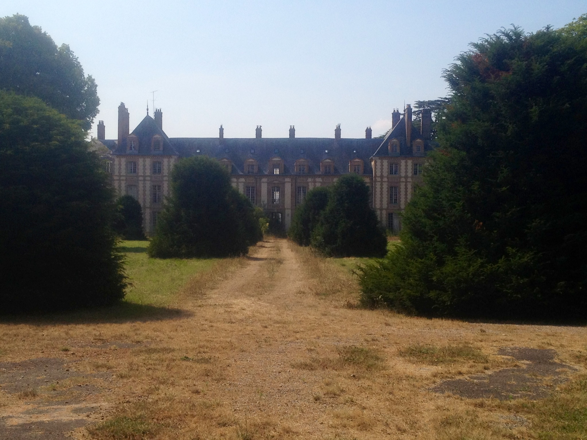 Château d'Abondant, Eure-et-Loir (France).